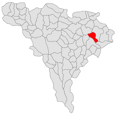 Categorie:Hărţi ale judeţului Alba